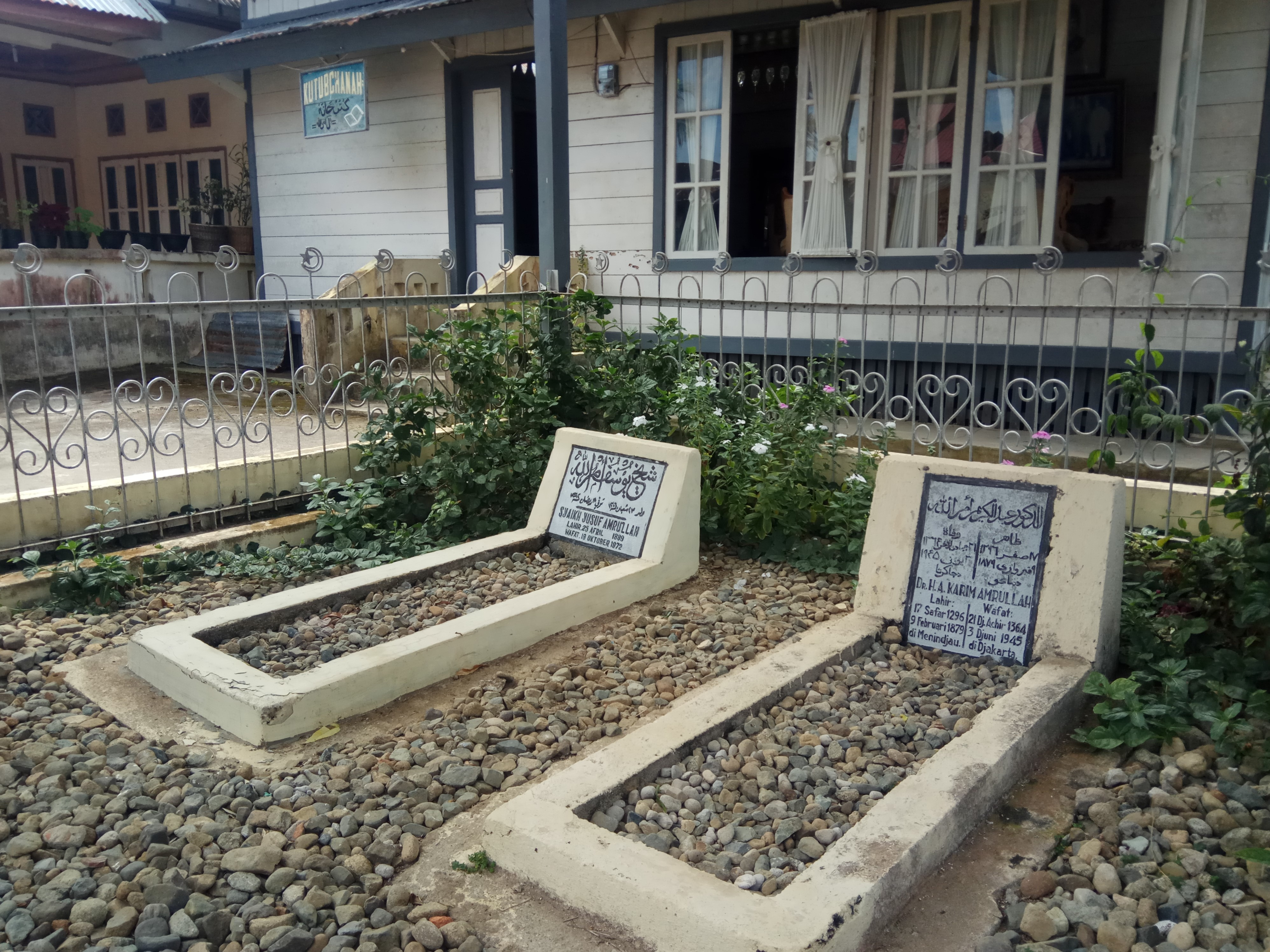 Makam Yusuf Amrullah dan Abdul Karim Amrullah